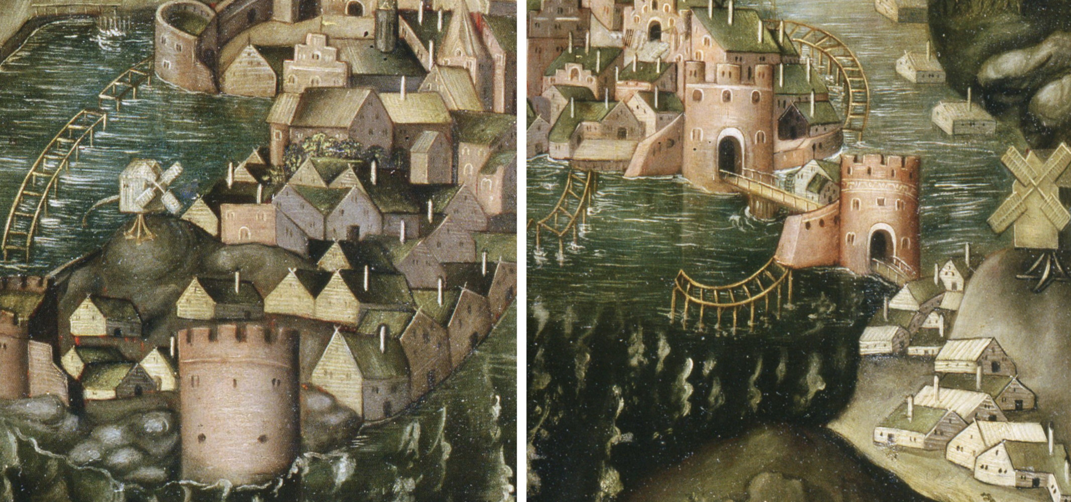 Vädersolstavlans båda väderkvarnar 1535